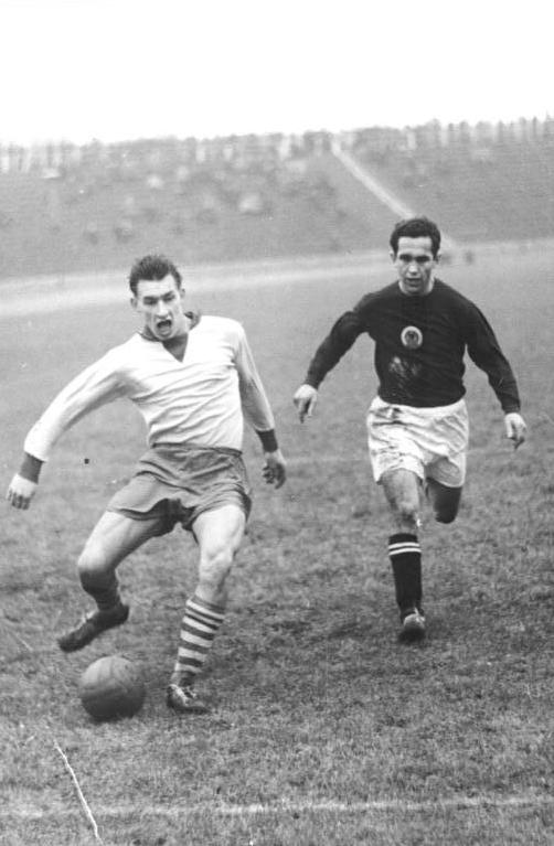 ADN-ZB-Bey-Wen. Mü. 9.12.1956 Vorwärts erreichte Pokalendspiel - Am Sonntag, dem 9.12.1956, standen sich im Berliner Jahn-Stadion im FDGB-Vorschlussrundenspiel der Fußballer die Mannschaften von Vorwärts Berlin und Wismut Karl-Marx-Stadt gegenüber. Durch einen 2:0 Sieg erkämpfte sich die Berliner Mannschaft den Einzug in das Finale. UBz: In diesem Augenblick fiel das 1:0. Assmy (links) schob den Ball überlegt am Torwart vorbei zum ersten Treffer ein. Der Wismutverteidiger Bauer (rechts) kam zu spät, um eingreifen zu können.